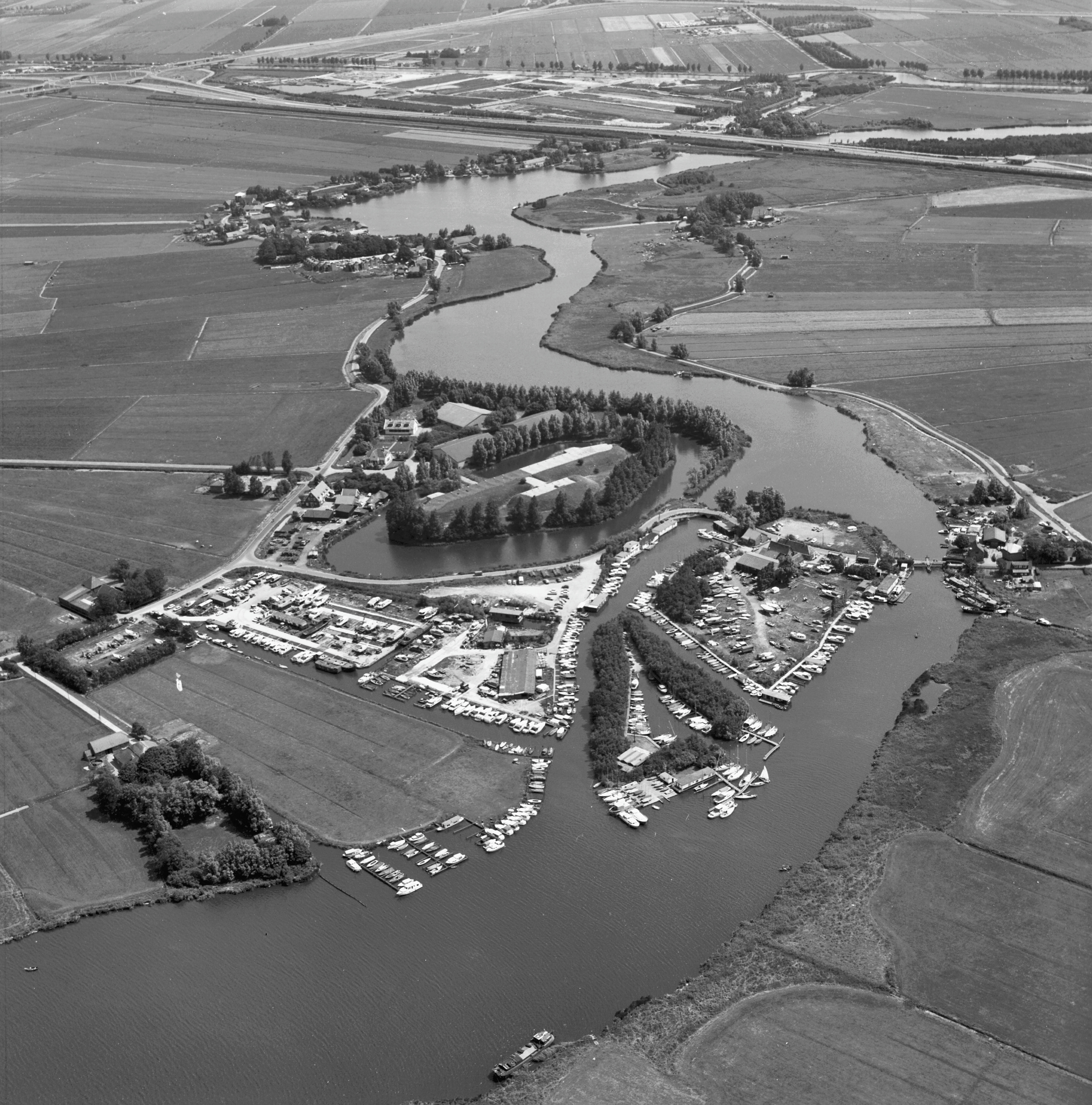 luchtfoto's